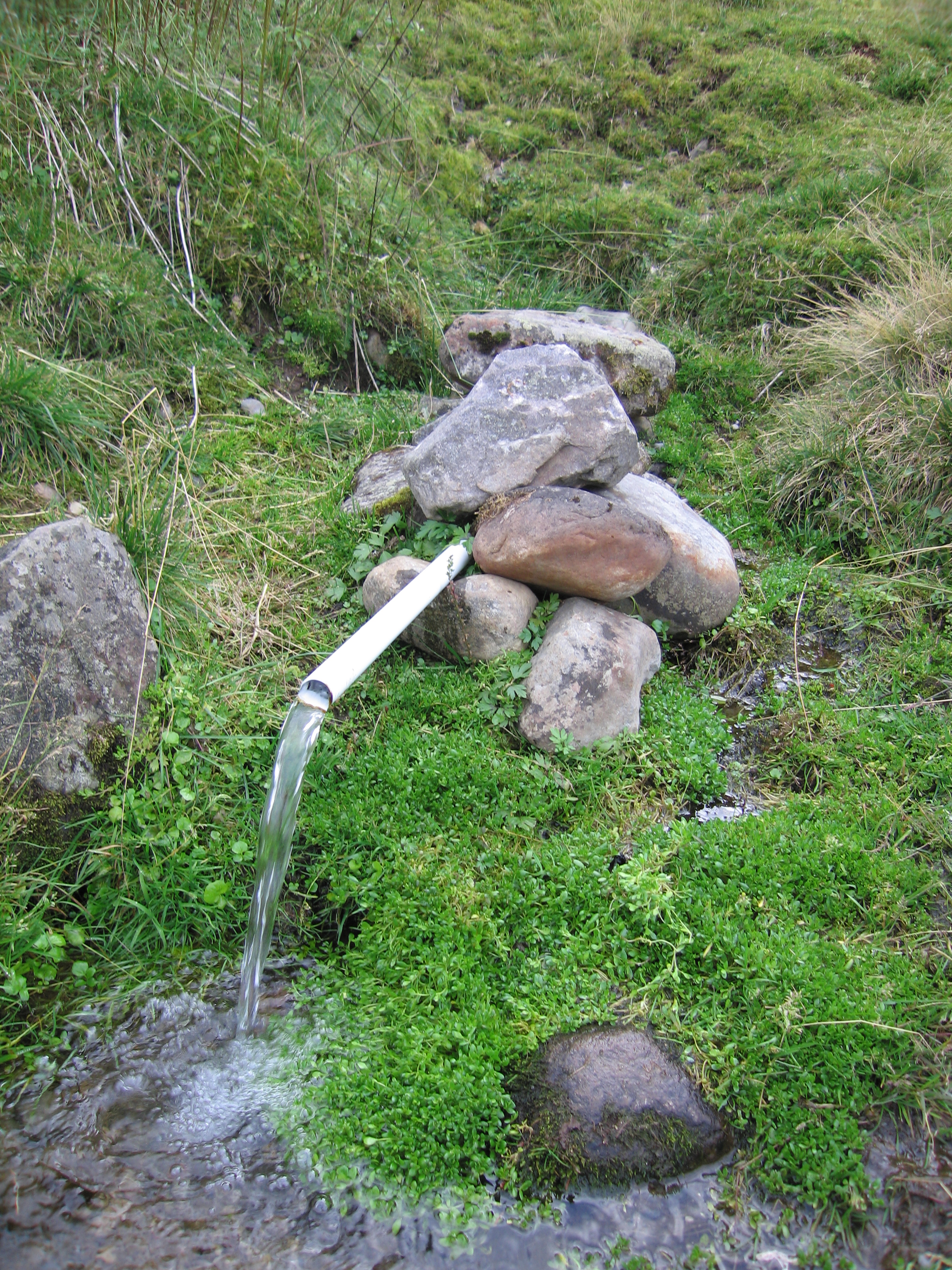 Kilde i Åstadalen, Hedmark. Vannet ledes gjennom et rør for å lette tilgjengeligheten da kilden benyttes som drikkevann.